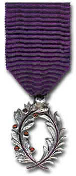 Avers Chevalier des Palmes Académiques